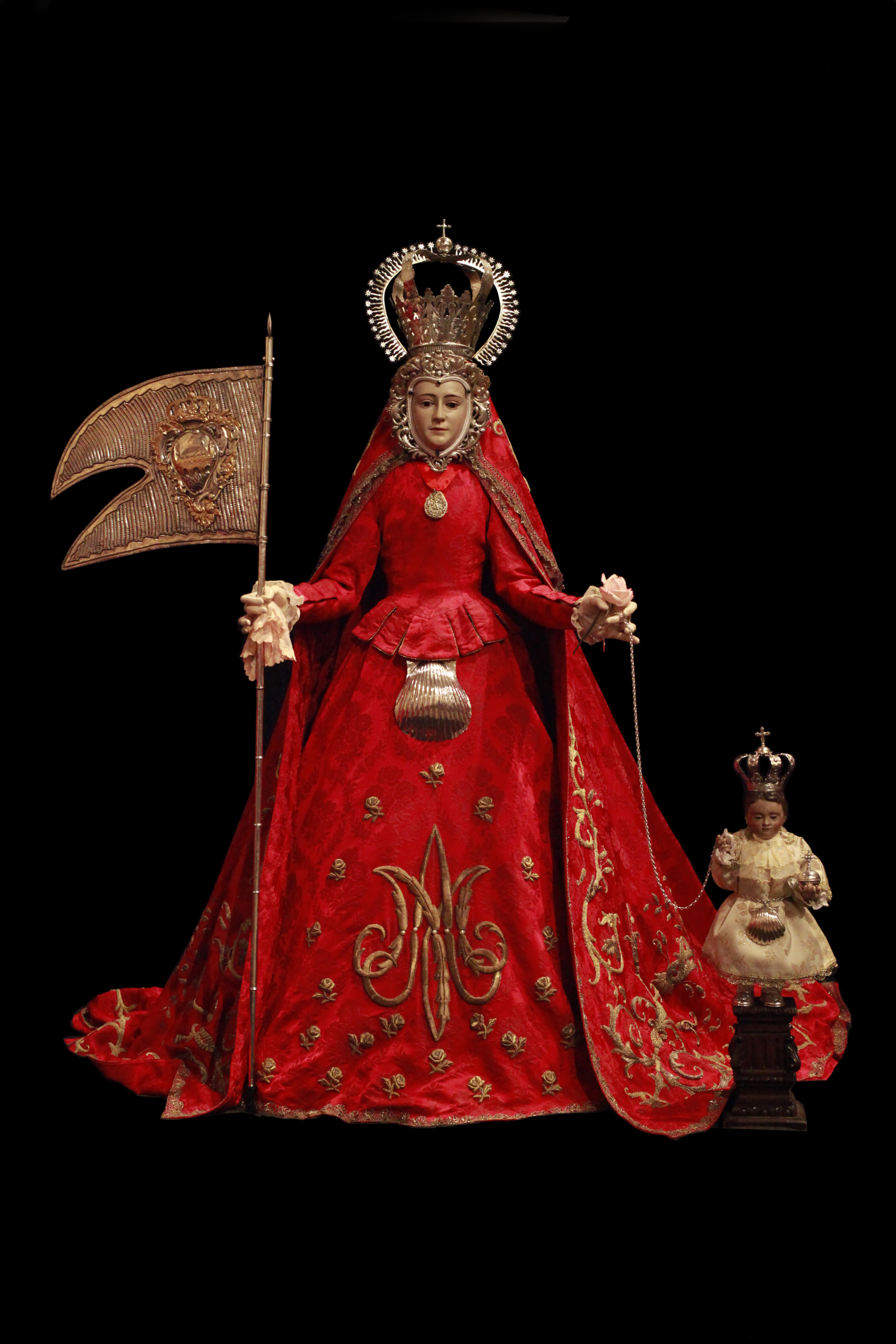 Ntra. Sra. de San Antolín o de la Concha